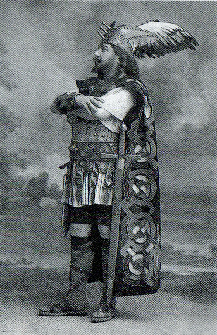 Tenor español. Moyá (Barcelona) (1863-1933)